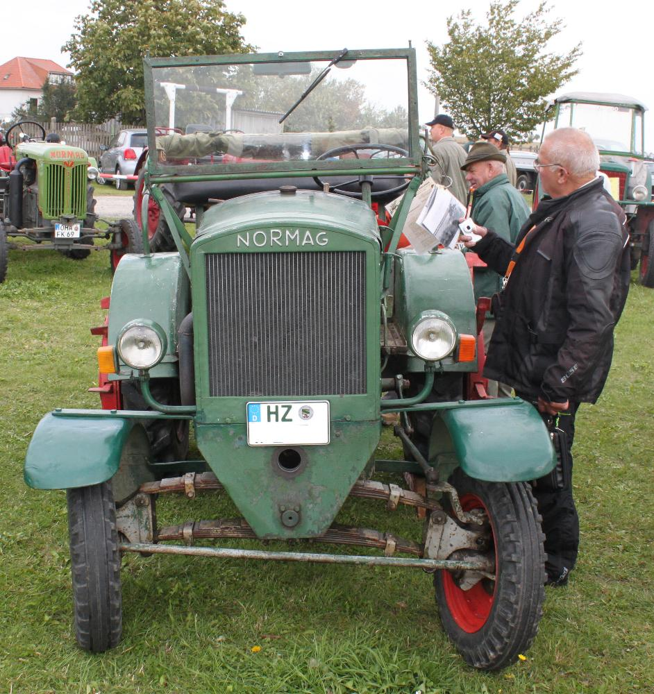 Normag Traktor NG22, Baujahr 1941 Mit Gummireifen auf besonderen Bezugsschein